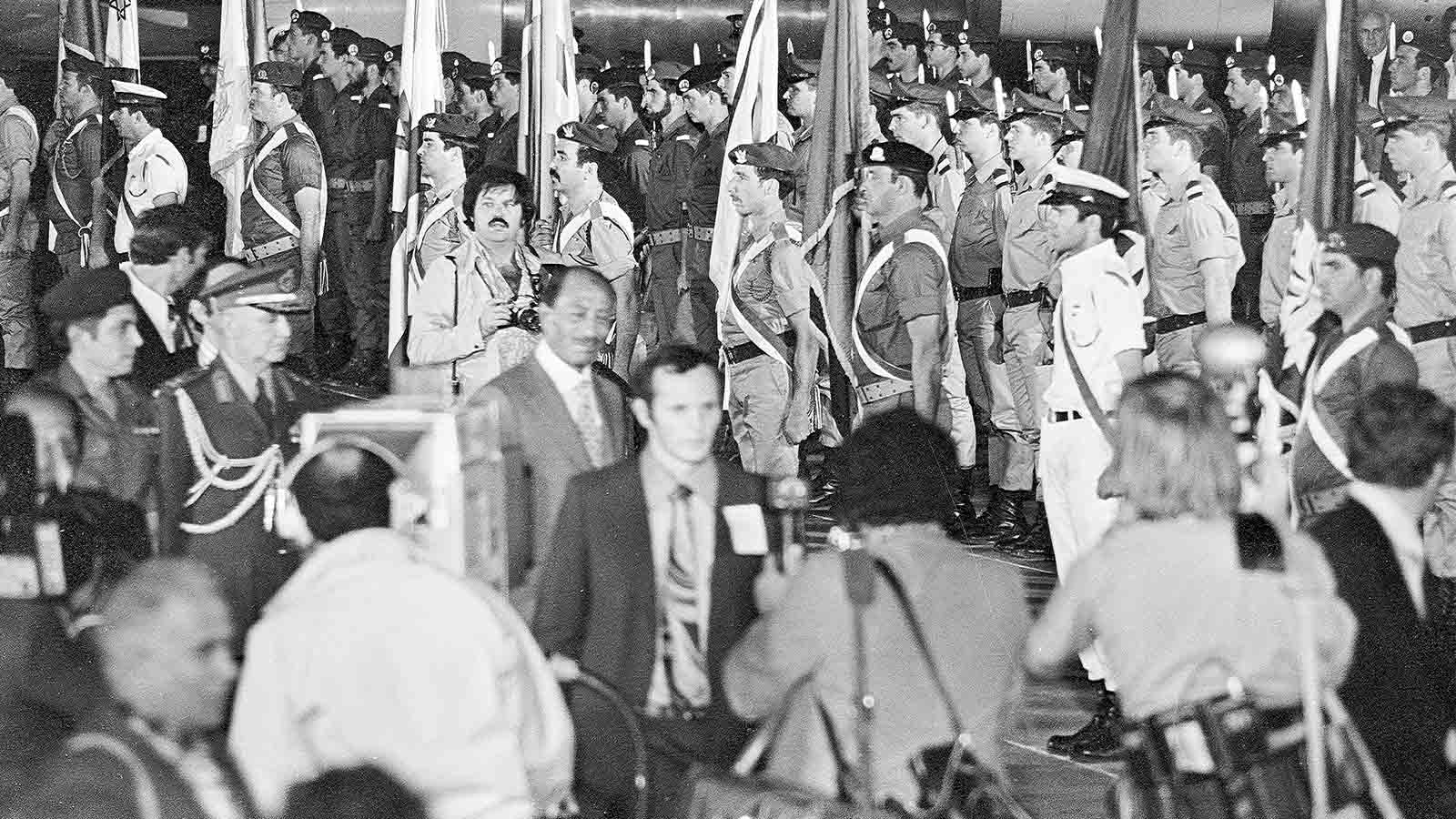 נחיתת הנשיא אנואר סאדאת בנמל התעופה בן גוריון. בתמונה: הנשיא סאדאת (במרכז) צועד על פני משמר כבוד ודגלני צה"ל. מאחורי סאדאת אוחז במצלמה, צלם לשכת העיתונות הממשלתית, משה מילנר.